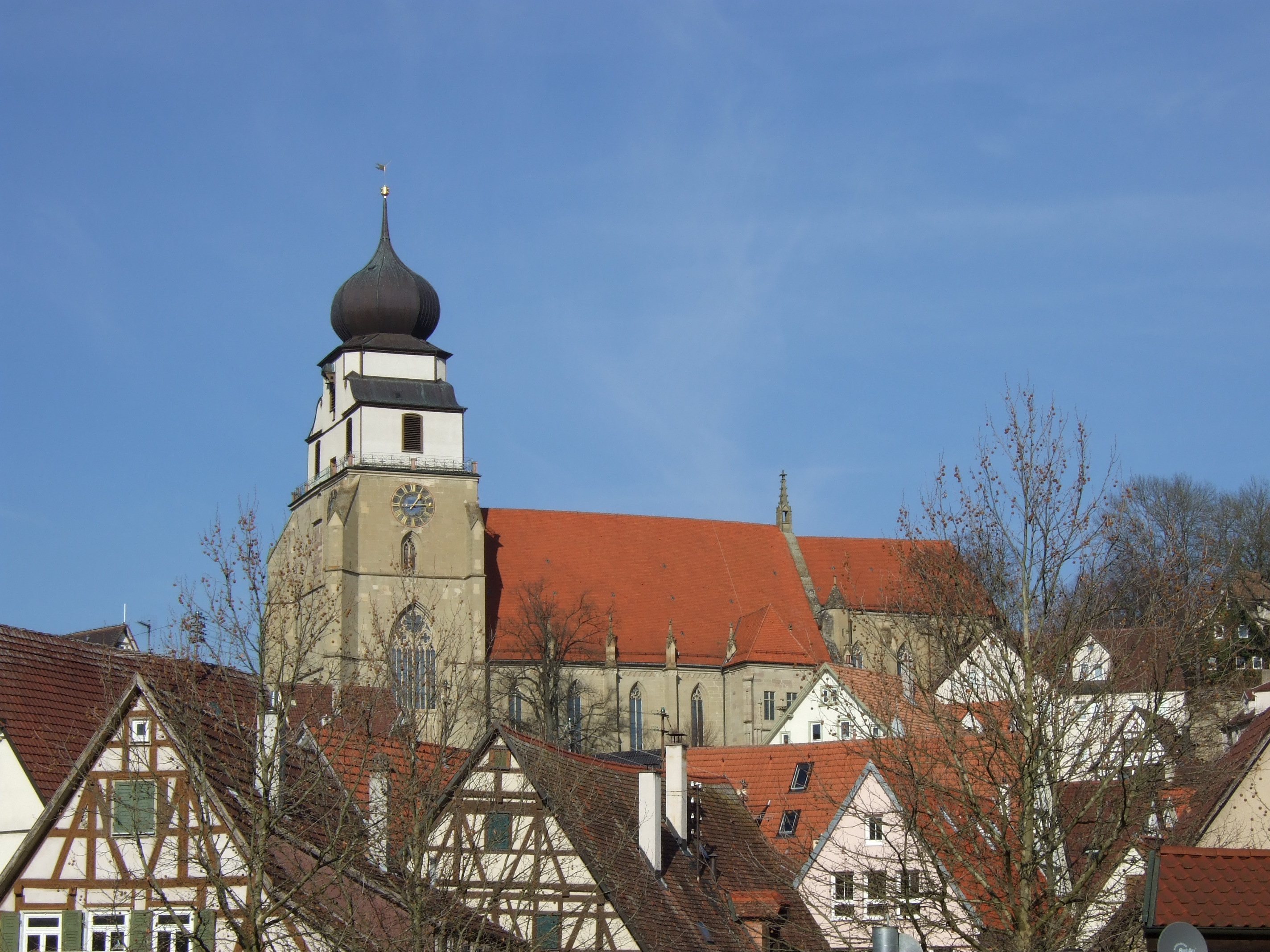 Herrenberg mit Stiftskirche